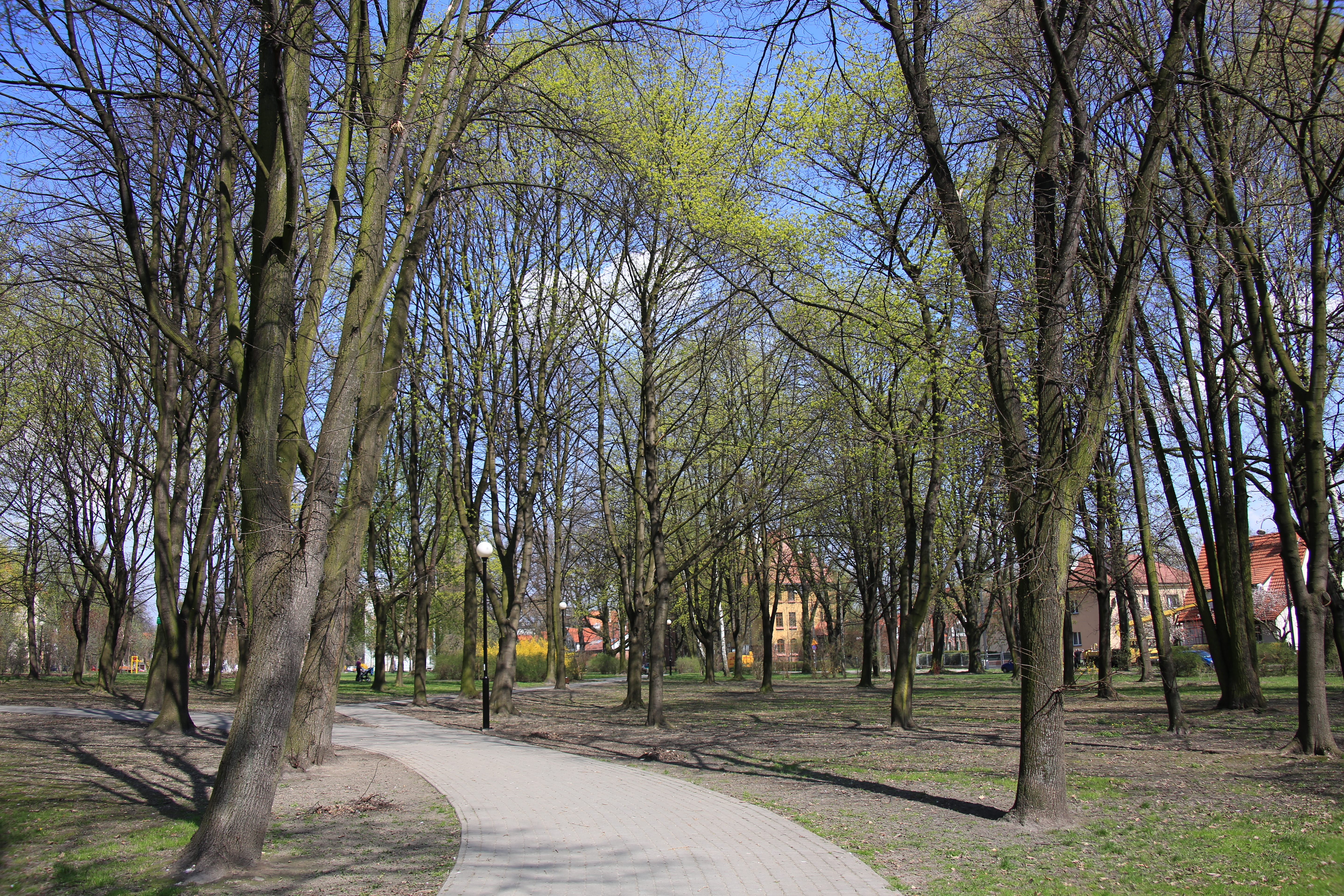 Plac Grunwaldzki i okolice